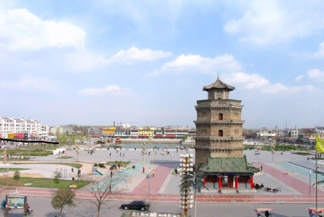 郓城县的标志性建筑-唐塔